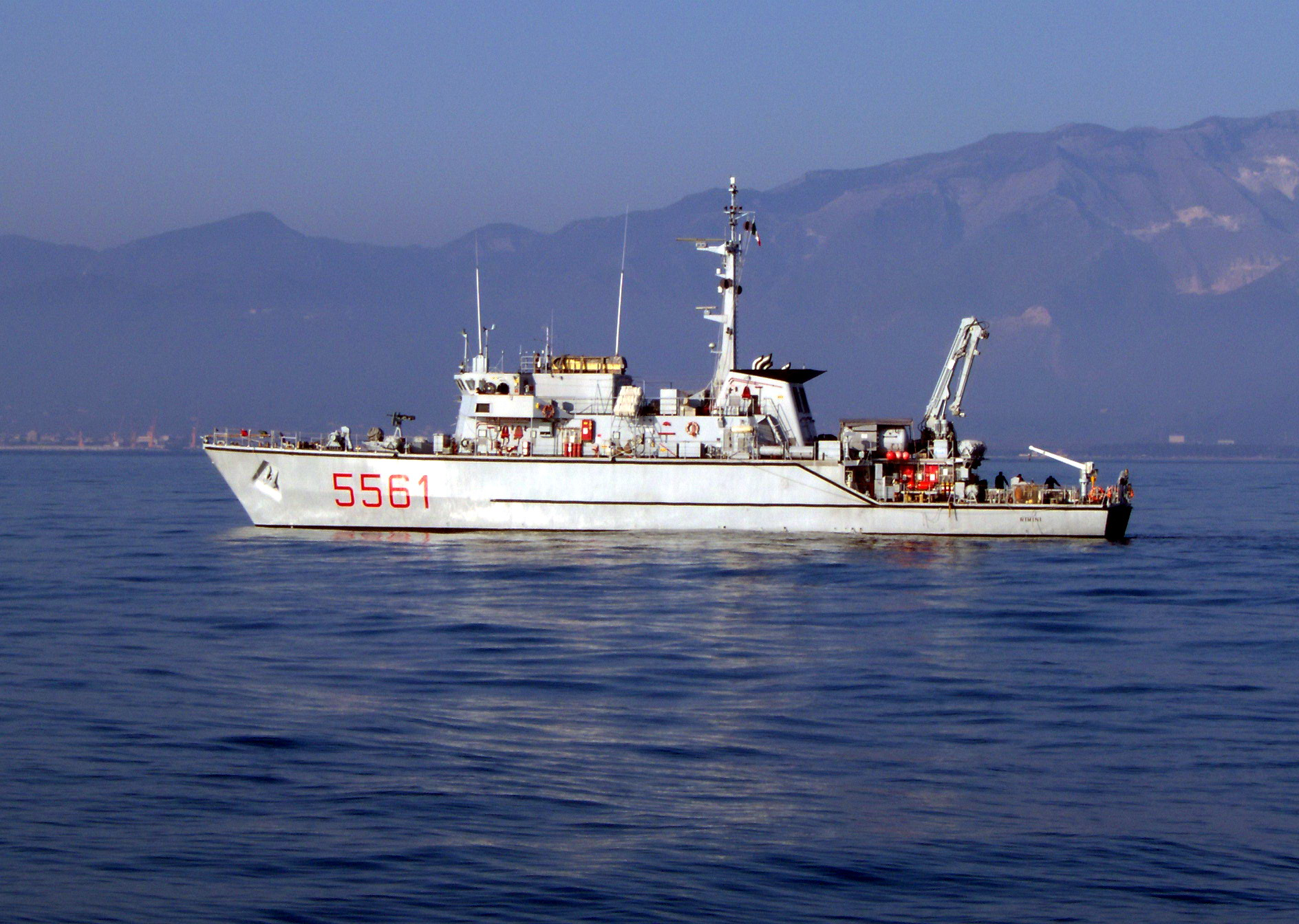 Il cacciamine Rimini nelle acque di La Spezia